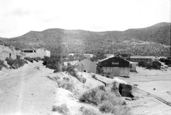 Una foto de 1930, siguiendo la clausura del ferrocarril, pero antes de ser desarmada, en la dirección opuesta desde el muelle hasta tierra adentra.